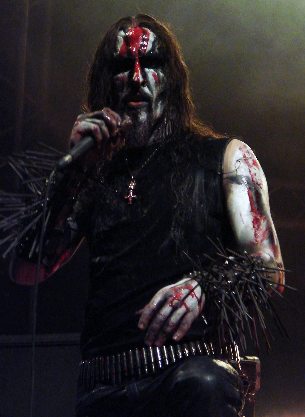 God Seed au Hellfest 2009: Gaahl.